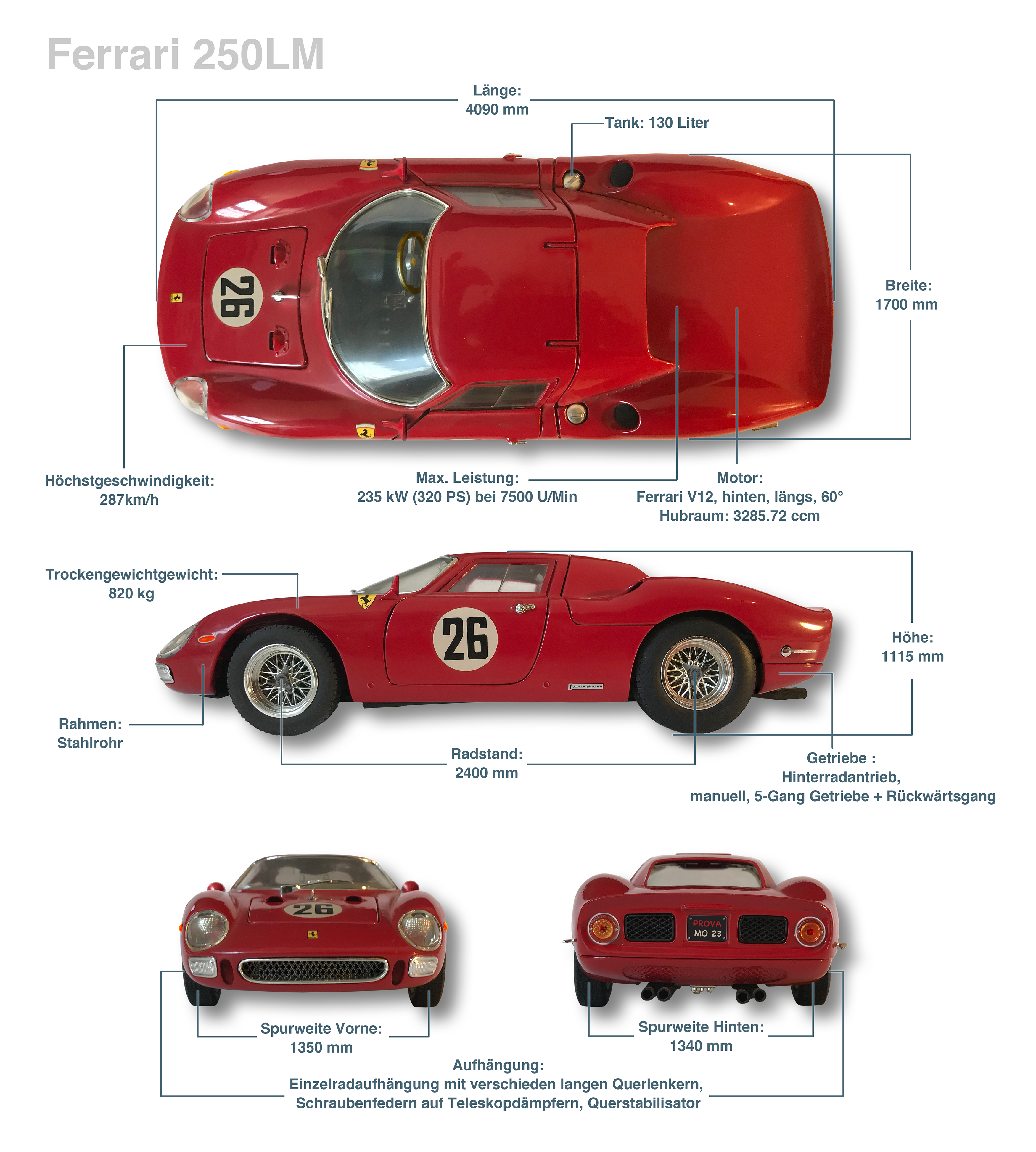 Grafisch aufbereitete Basis-Informationen zum Ferrari 250LM